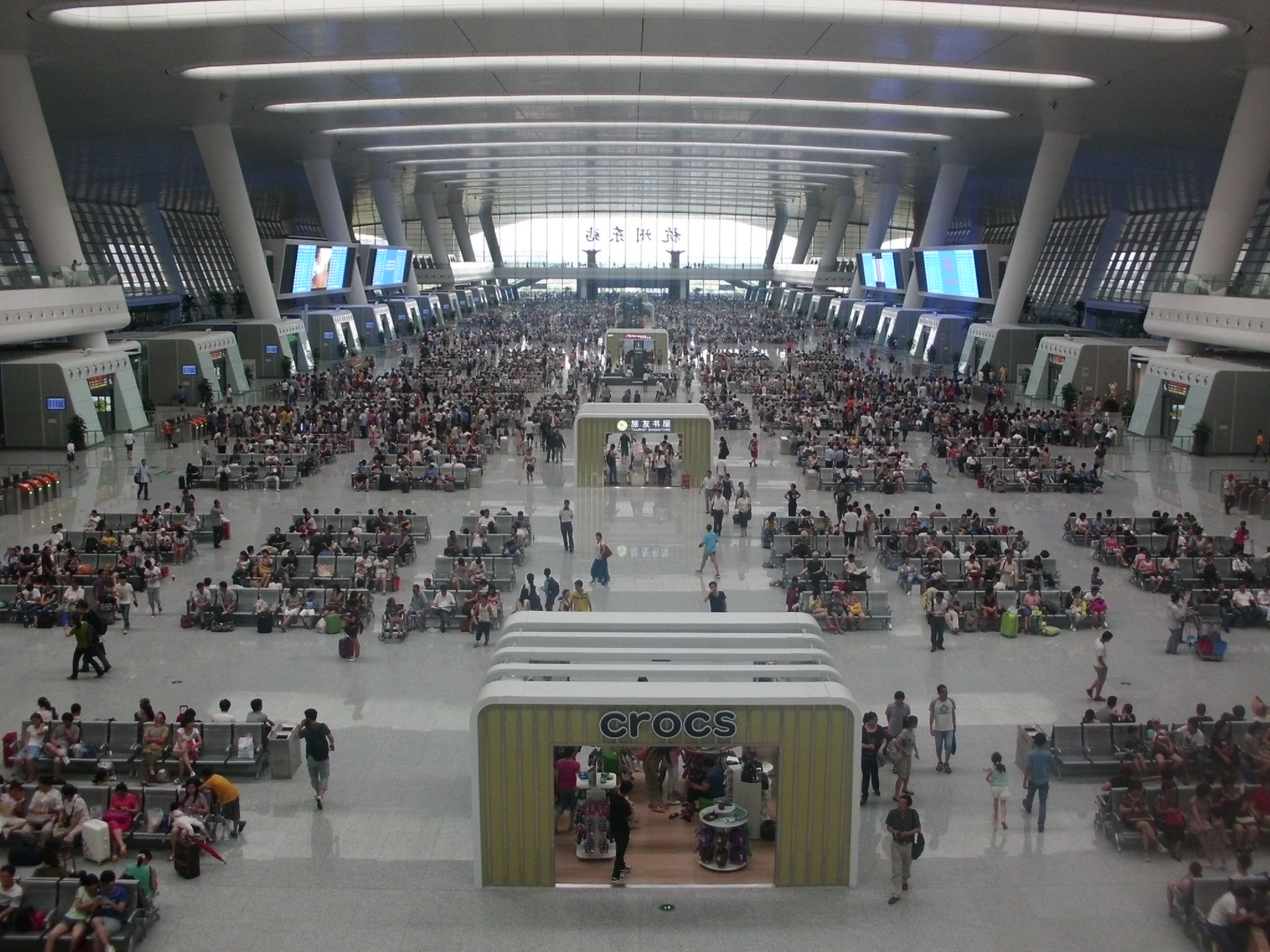 Hangzhoudong Railway Station